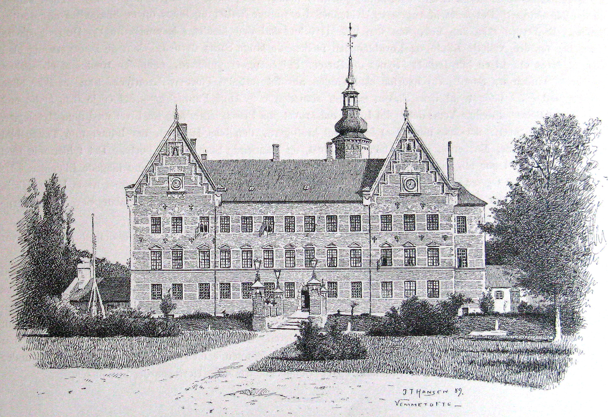 Vemmetofte er en gammel hovedgård, som næves første gang i 1320. Vemmetofte ligger i Vemmetofte Sogn i Faxe Kommune. Hovedbygningen er opført i 1500 og udvidelser i 1600-1630 og er ombygget i 1715-1724 ved J. C. Ernst og er igen ombygget i 1907 ved Axel Berg. Vemmetofte blev af prinsesse Sophie Hedevig omdannet til Jomfrukloster.